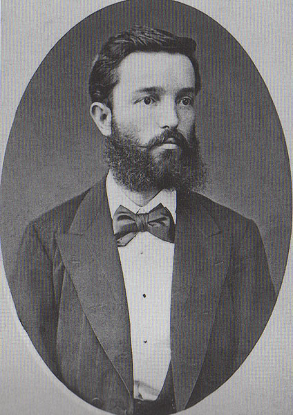 Димитрије Мита Ракић, писац (1846-1890)